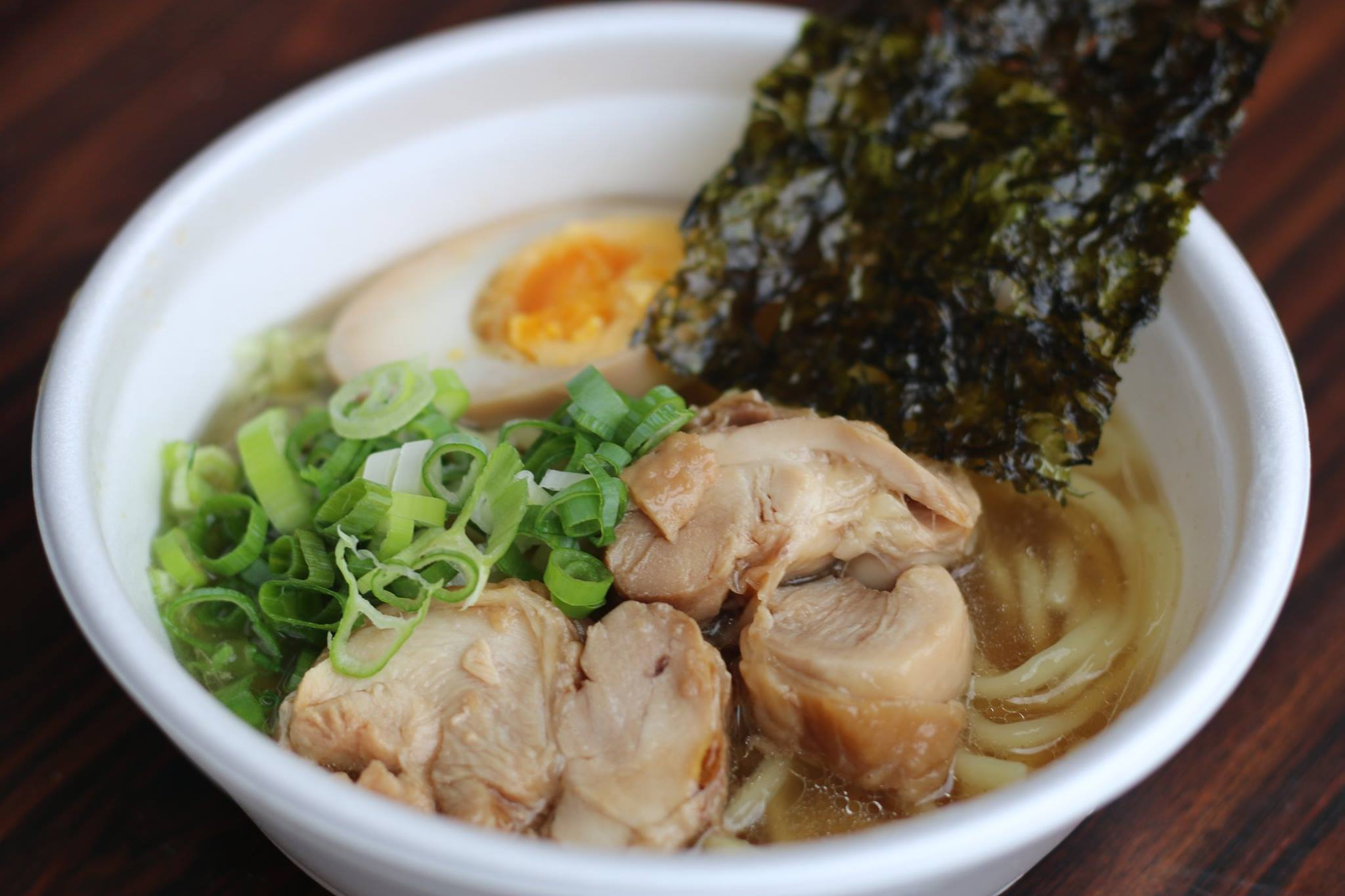 チームNGTの代表メニュー「ながとりめん」